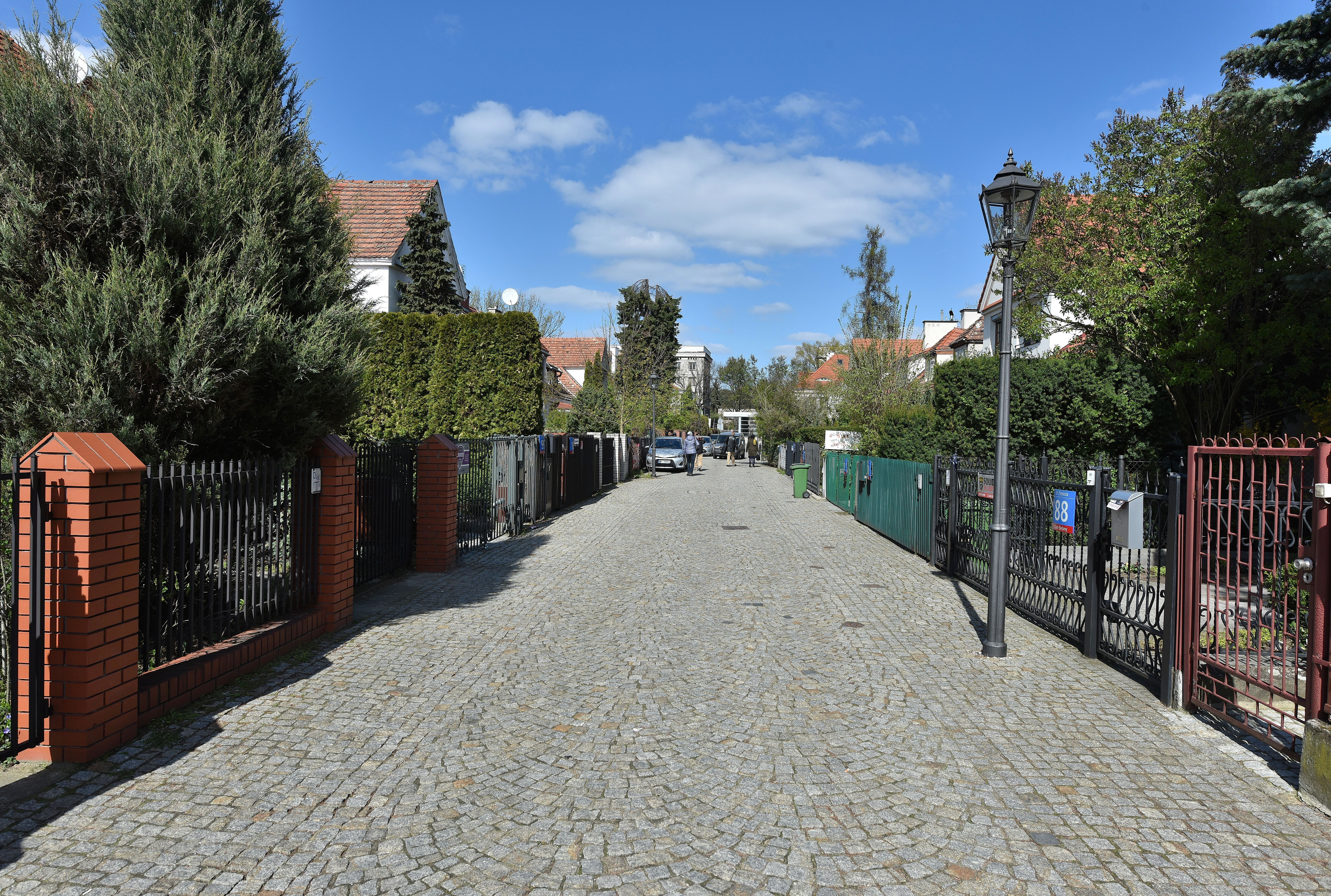 Ulica Płatnicza w Warszawie